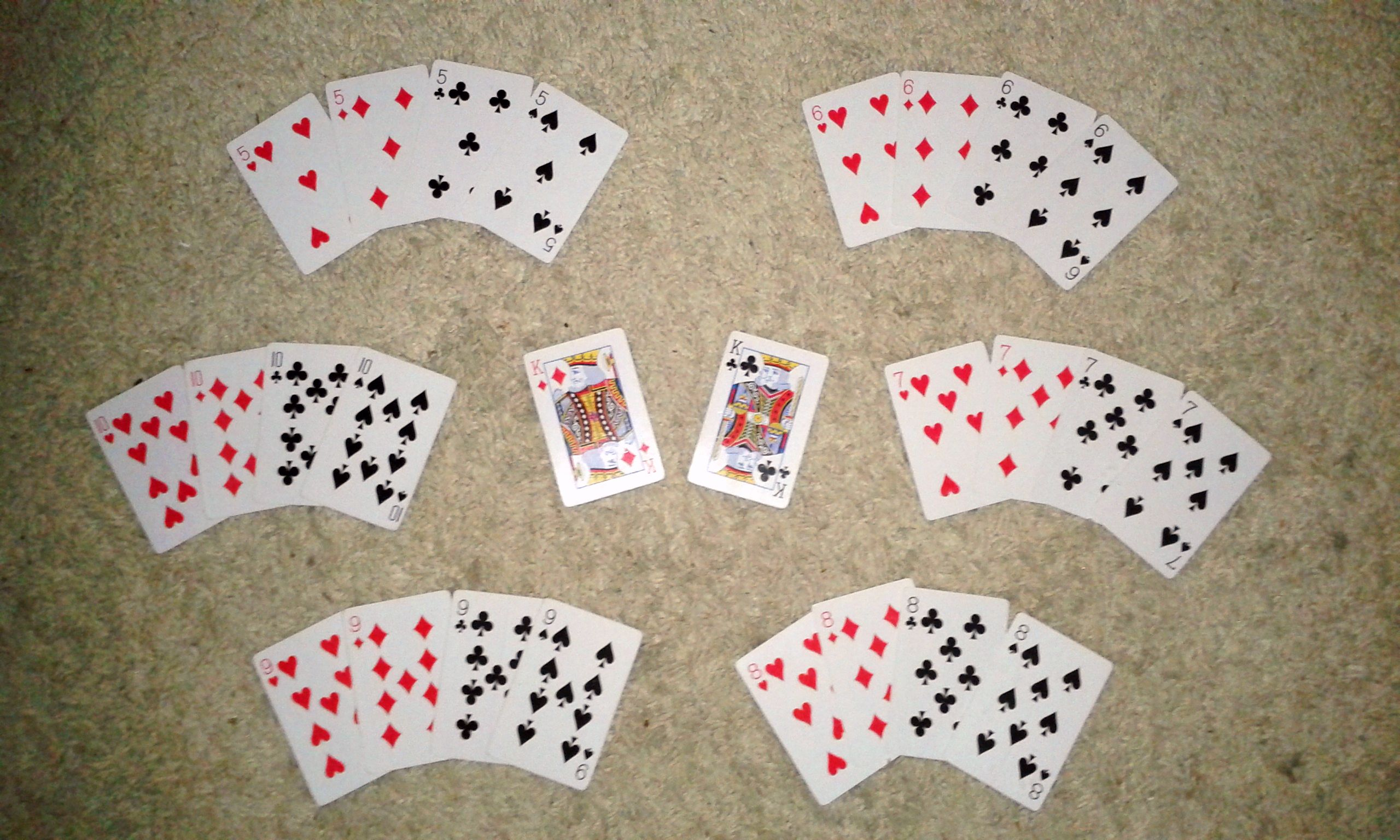 Karty niefunkcyjne w grze makao: 5, 6, 7, 8, 9, 10, król karo i król trefl